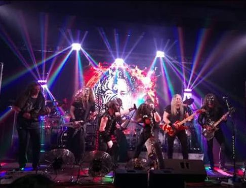 Arakain a Dymytry v Bezně na posledním koncertu Arakain Dymytry Tour 2016, 17.12.2016